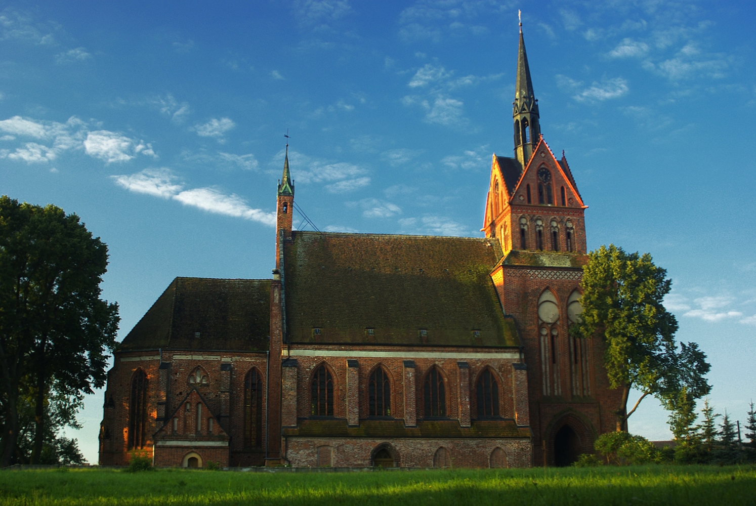 Chociwel - gotycki ceglany kościół parafialny